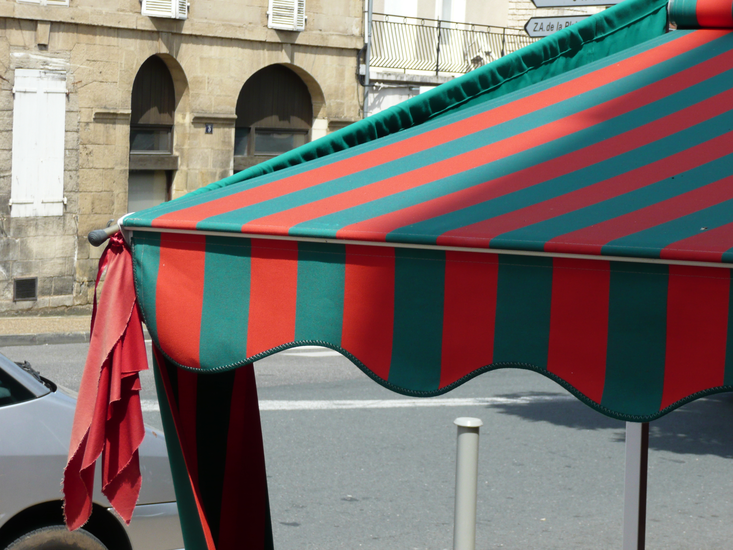 Toile en tissu rayé vert et rouge sur un marché de Gourdon (Lot, France). (Le terme bayadère est impropre pour ce type de tissu.)